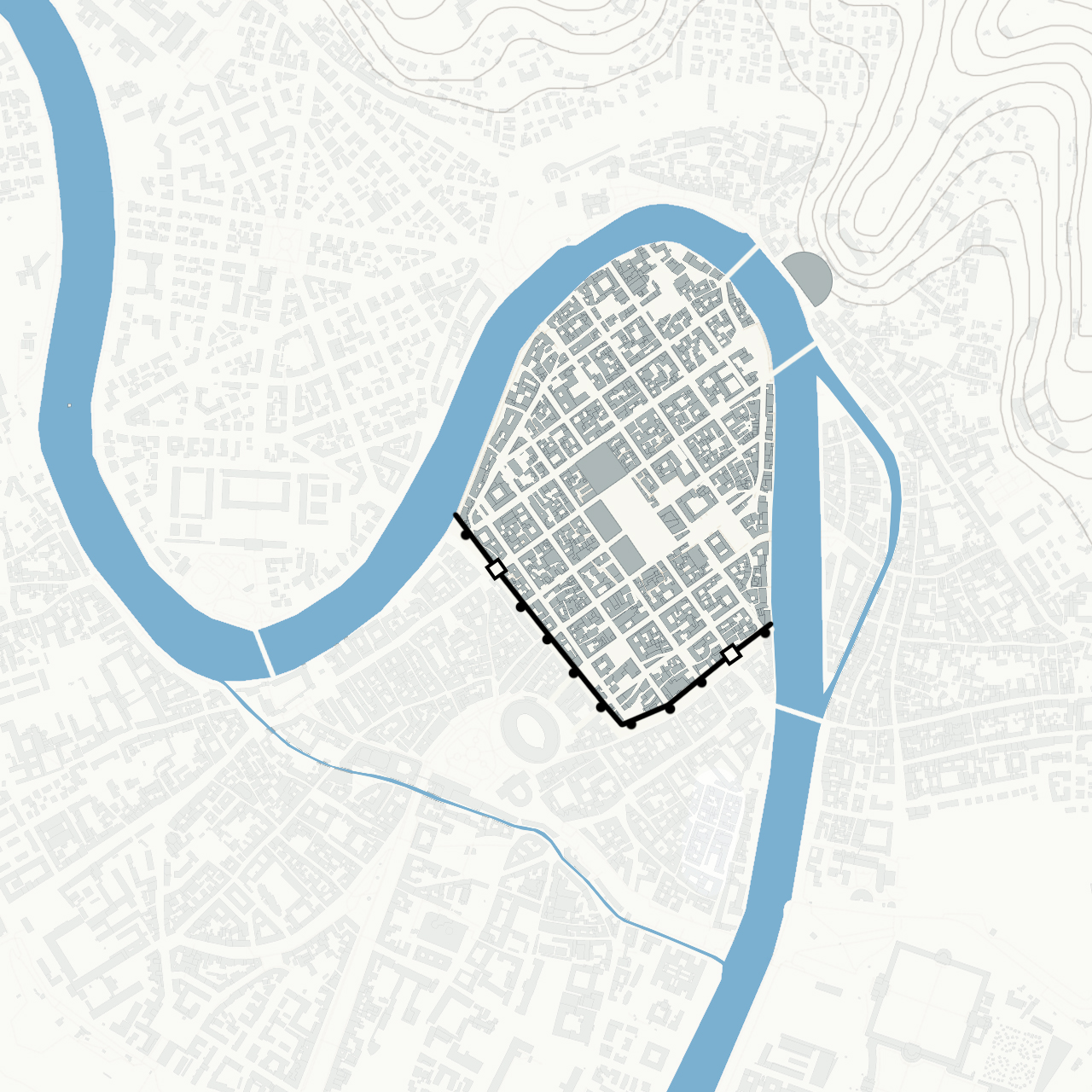 Planimetria della città di Verona con le mura e le porte urbiche principali. Vedi anche Le mura di Verona di Annamaria Conforti Calcagni.